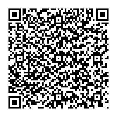 QRpedia-kód, amely a thai nyelvű Wikipédián Ajutthaja városról szóló szócikkre mutat